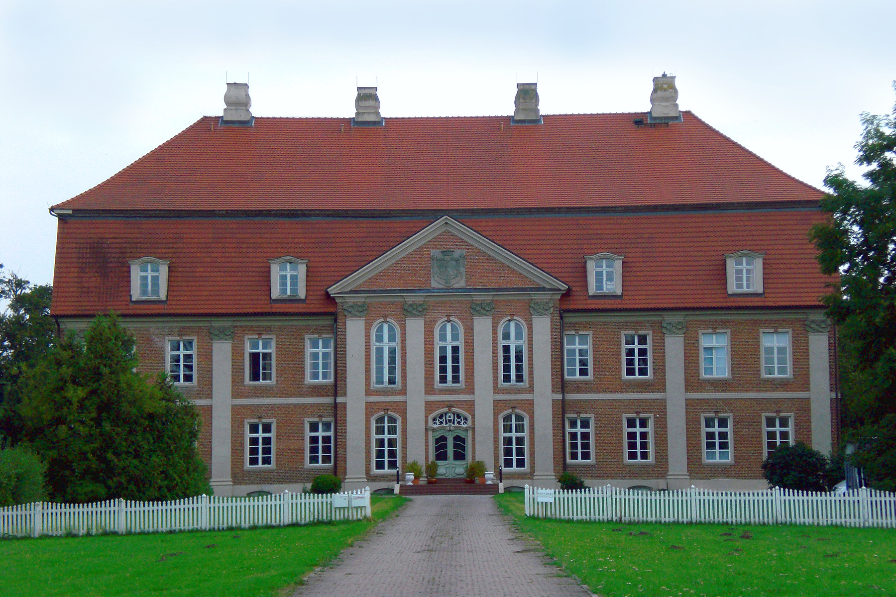 Seit 1395 bis zur Enteignung 1945 befand sich das Gut im Besitz der Familie von Bassewitz. Prebberede gilt als eins der größten Barockschlösser Mecklenburgs. 1772-1778 ließ Carl Friedrich Graf von Bassewitz durch den Güstrower Baumeister Sidon ein Barockschloss samt Marstallgebäuden errichten.